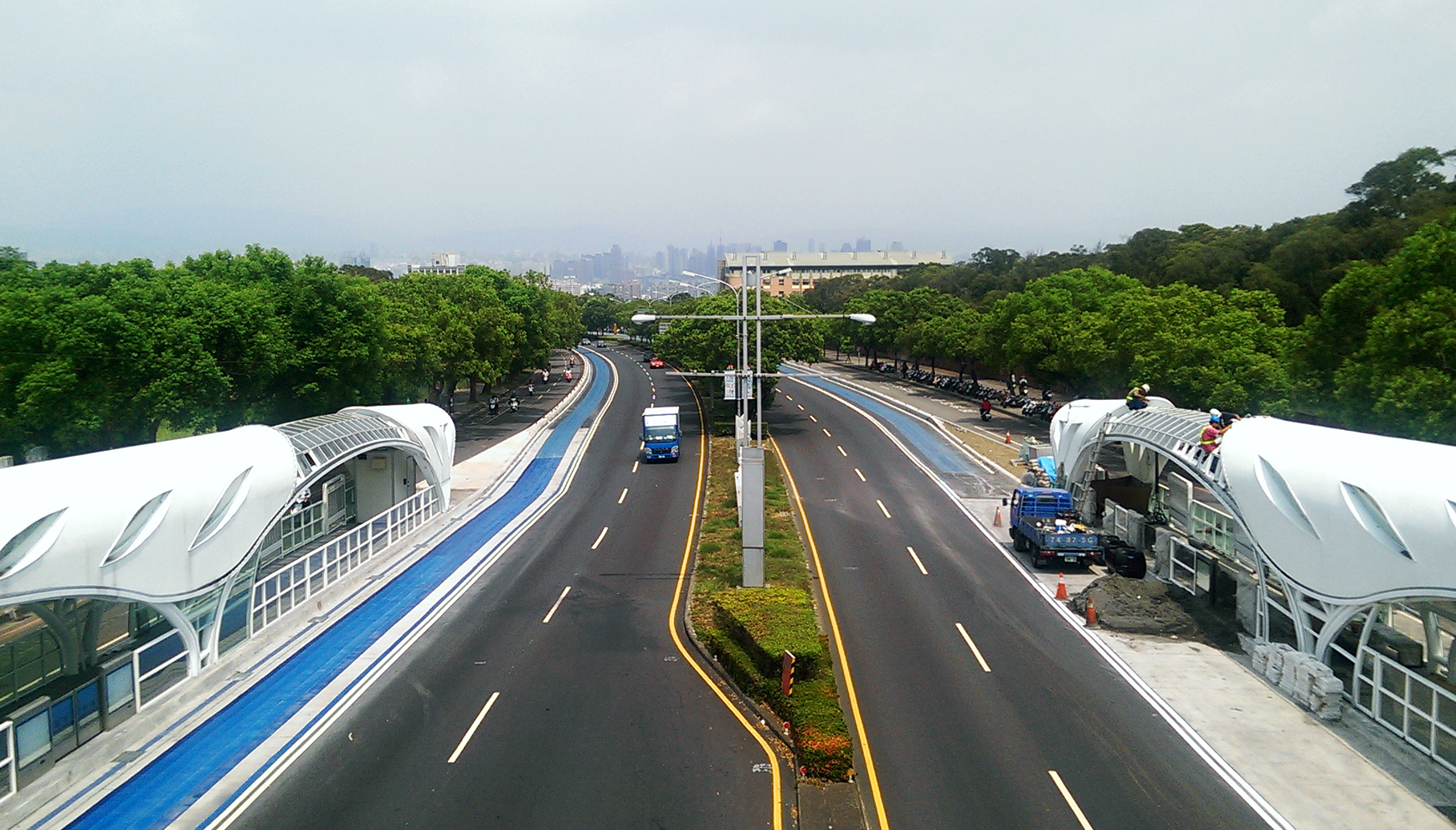 臺灣大道東海段